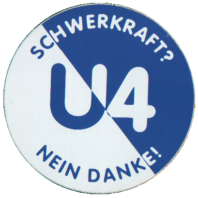 Schwerkraft? Nein danke! ** Der alte Werbe-Aufkleber des U4 (Club)s ** stellte eine Anspielung auf das Symbol der ** Anti-Atomkraft-Bewegung dar.